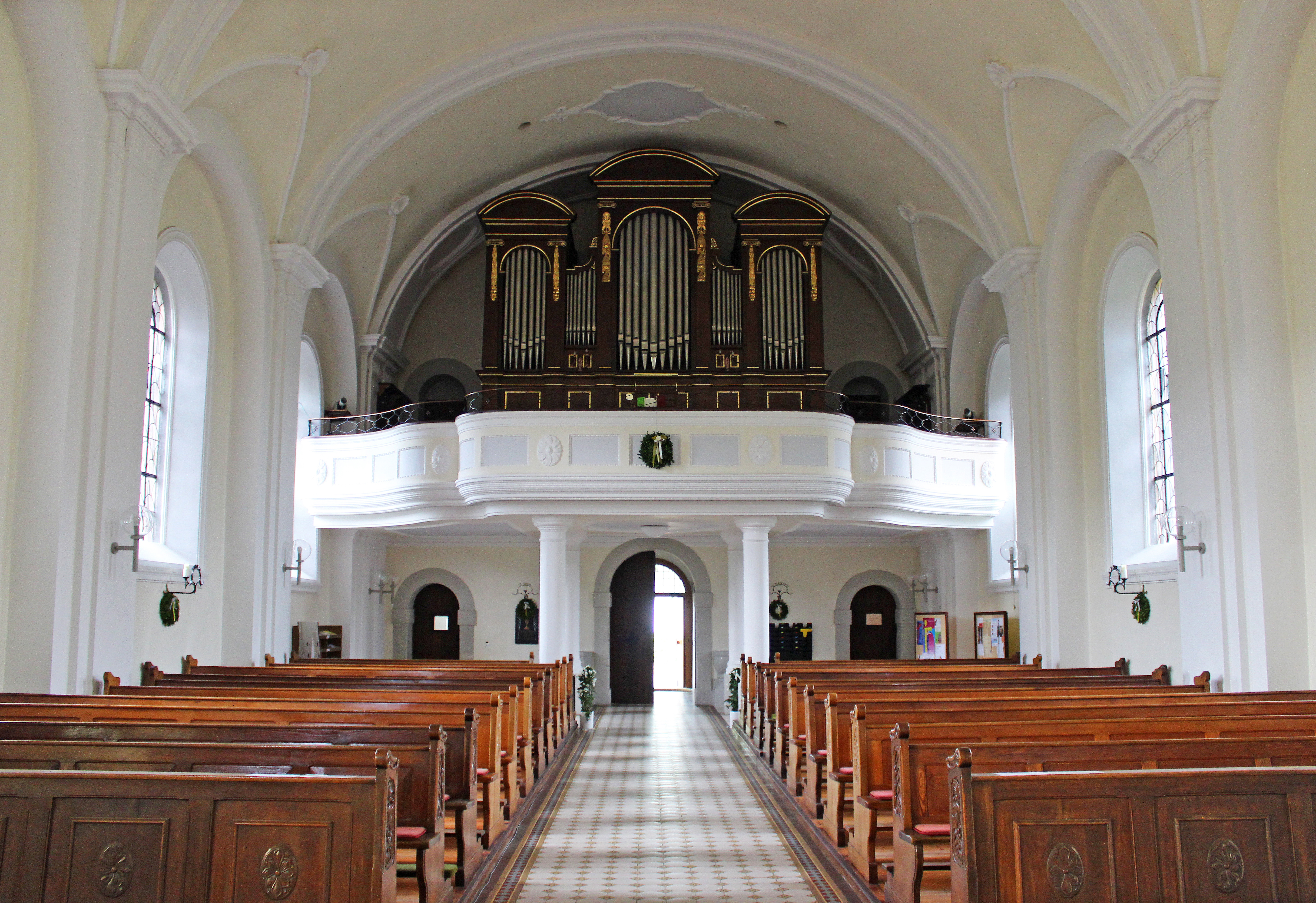 Blick ins Innere der katholischen Pfarrkirche St. Martin in Siersburg, Gemeinde Rehlingen-Siersburg, Landkreis Saarlouis, Saarland